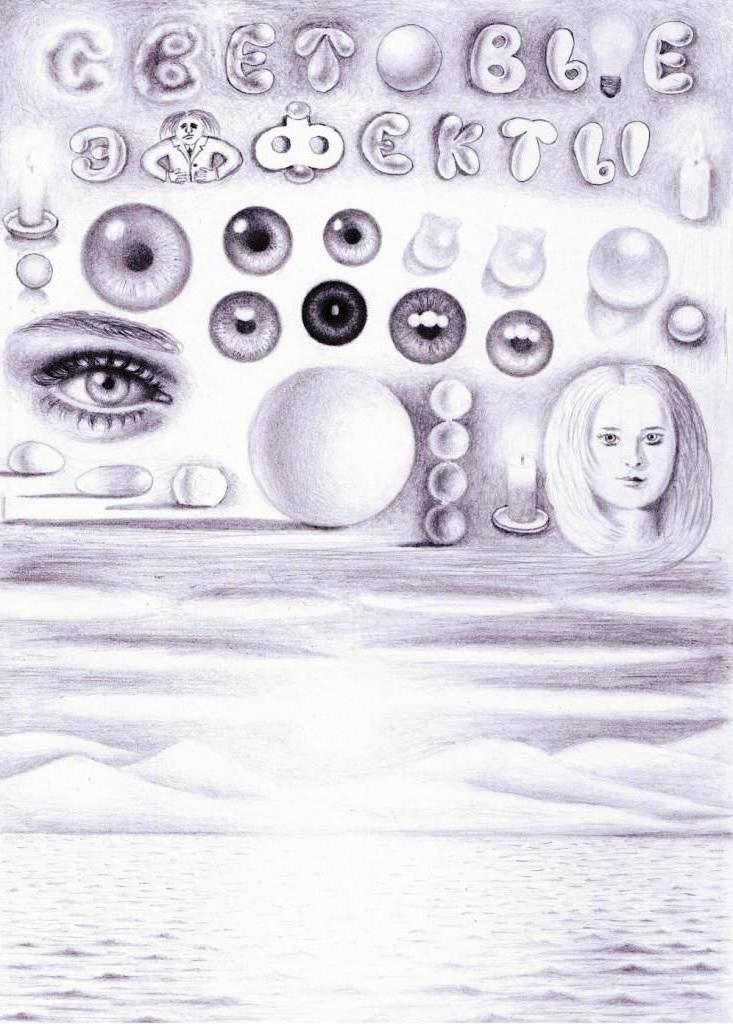 Рефлекс и прозрачность